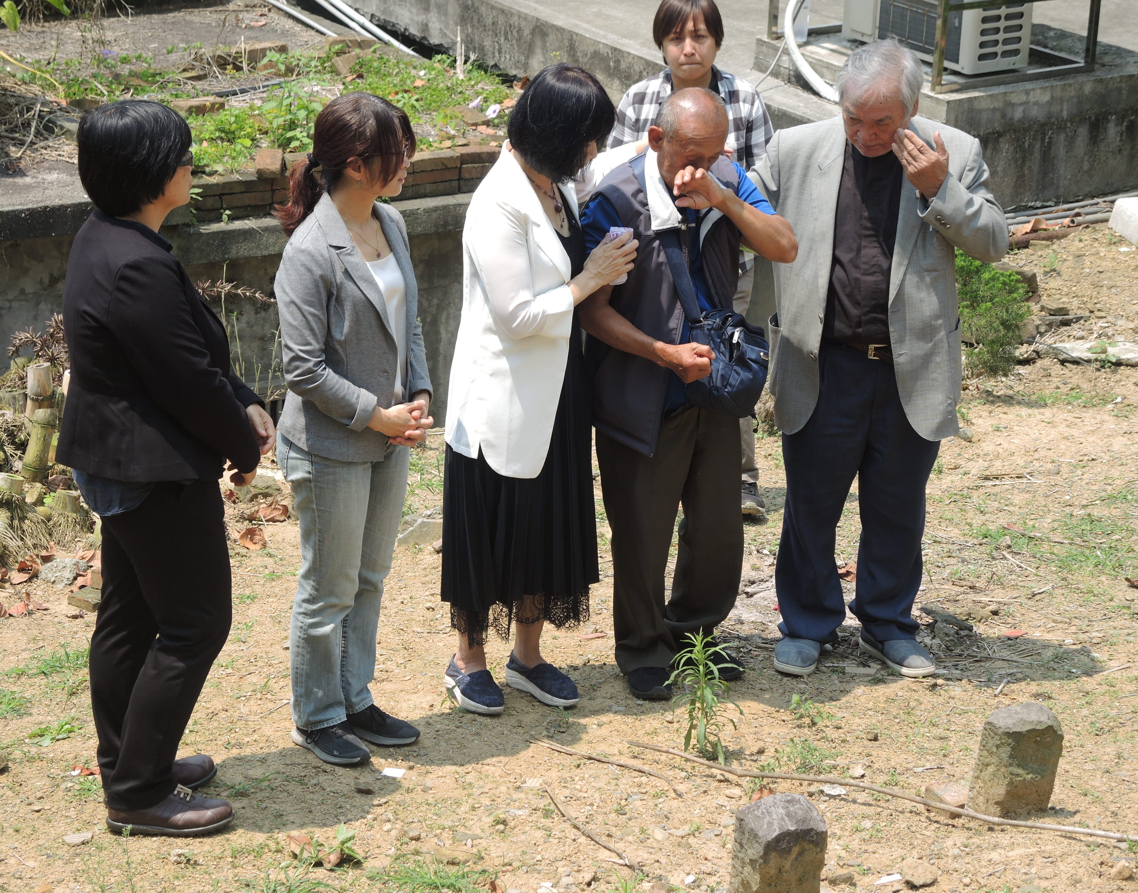 促進轉型正義委員會有關伍保忠先生新聞稿